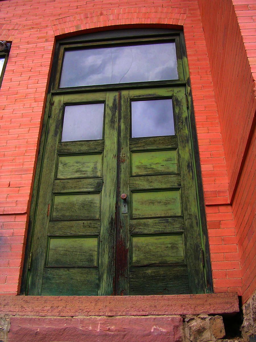 School in Russell Gulch, CO.